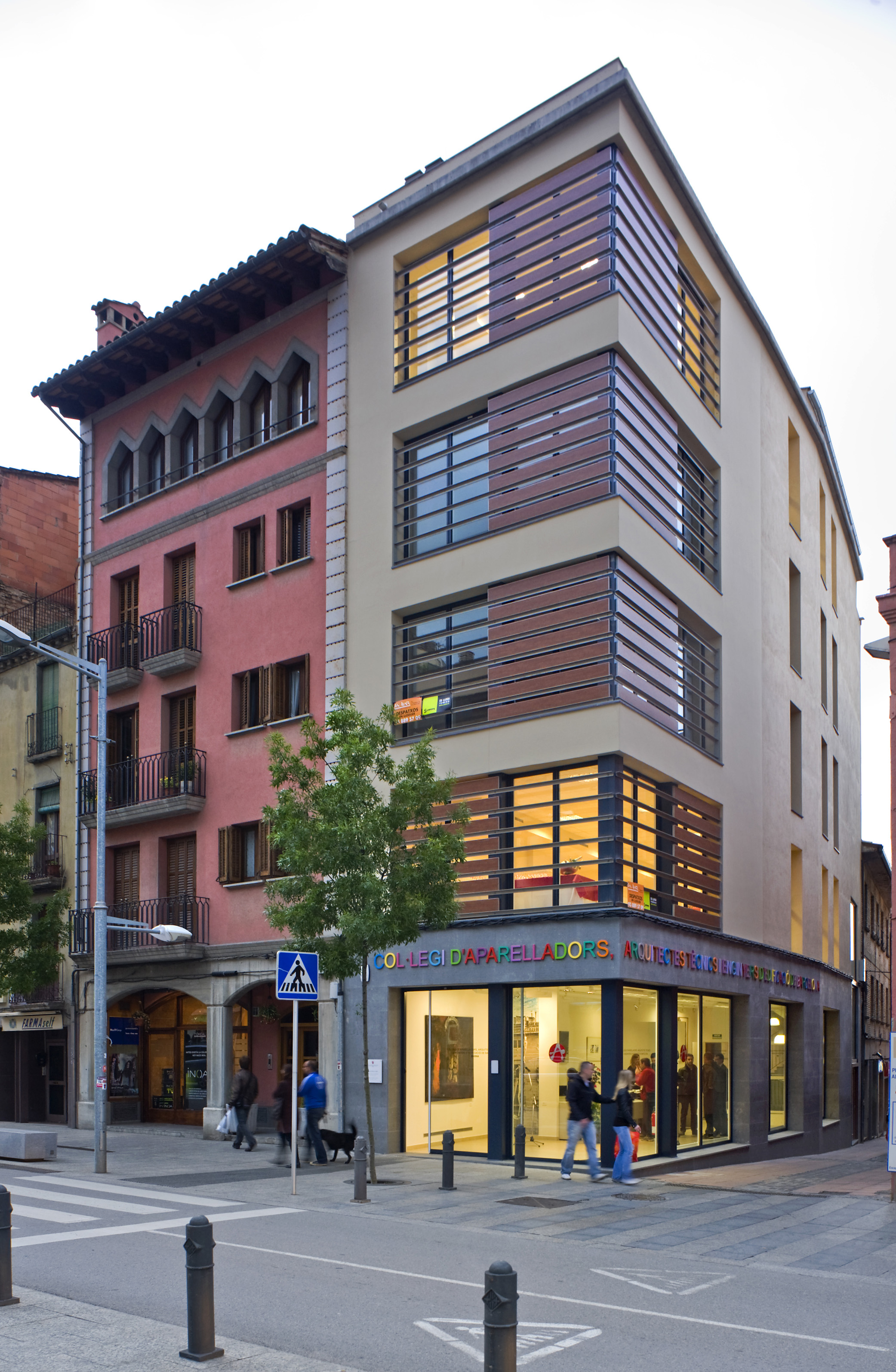 Seu: Vic, Rambla del Passeig, 21